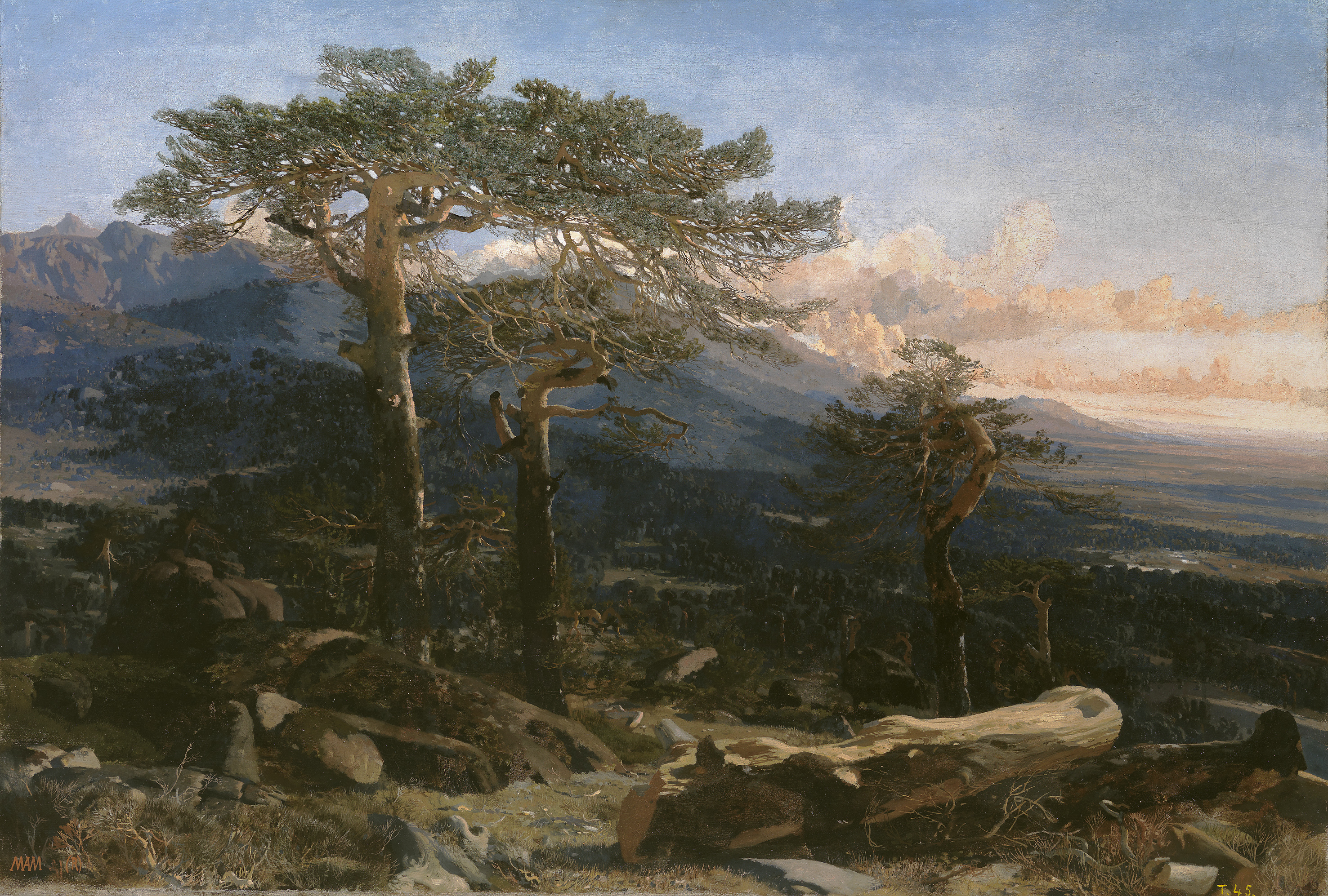 Paisaje que Rico presentó en la exposición Nacional de 1858. En primer plano unos pinos de Valsaín, y de fondo la sierra descendiendo hacia la llanura en la parte de La Pedriza.